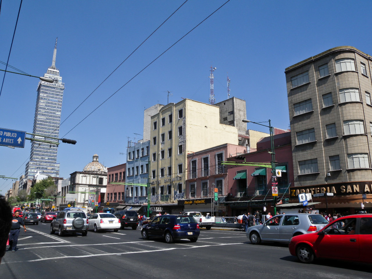 Centro Histórico, Ciudad de México